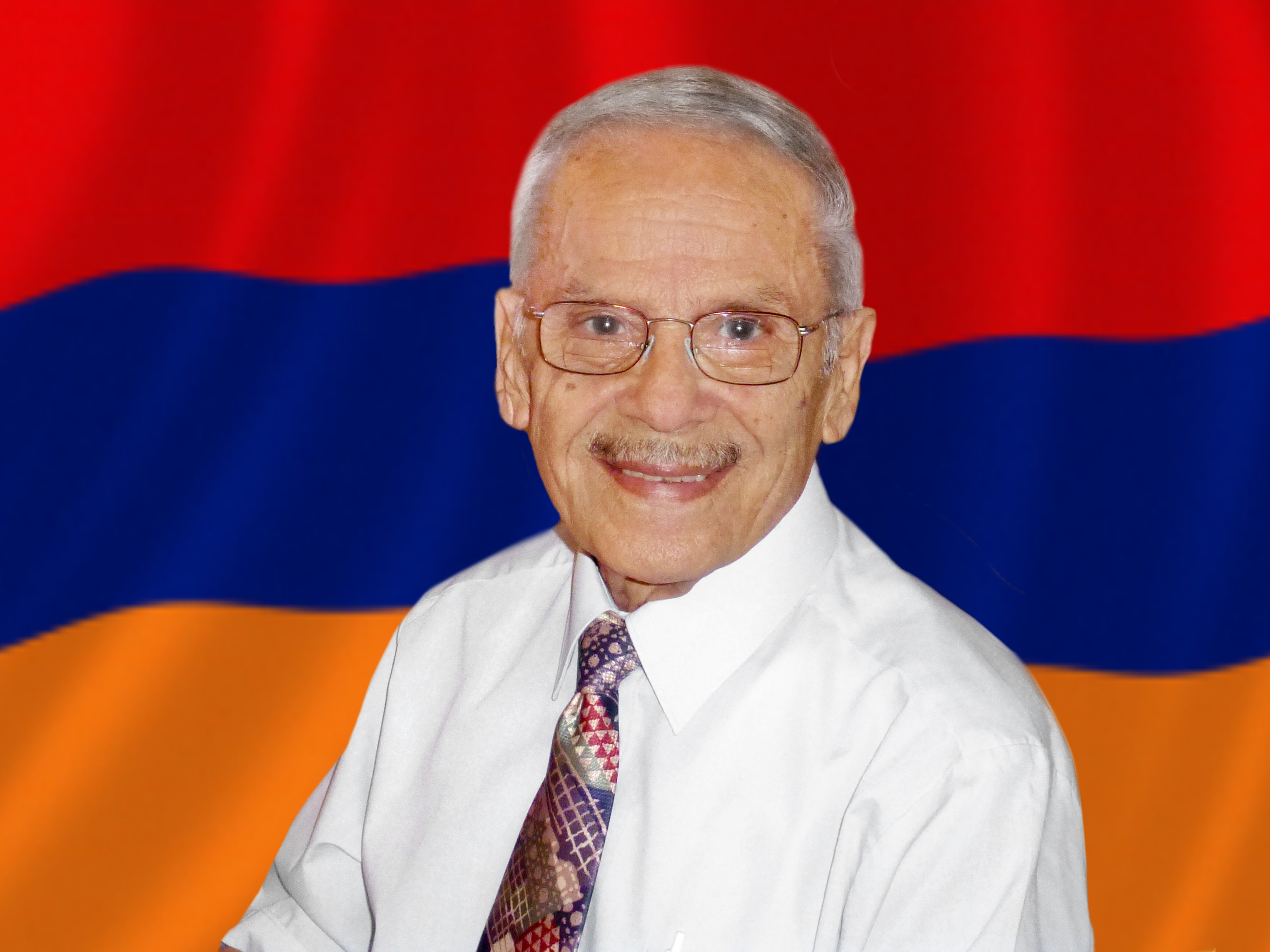 Մաքերտիչ «Մաք» Վահանեան